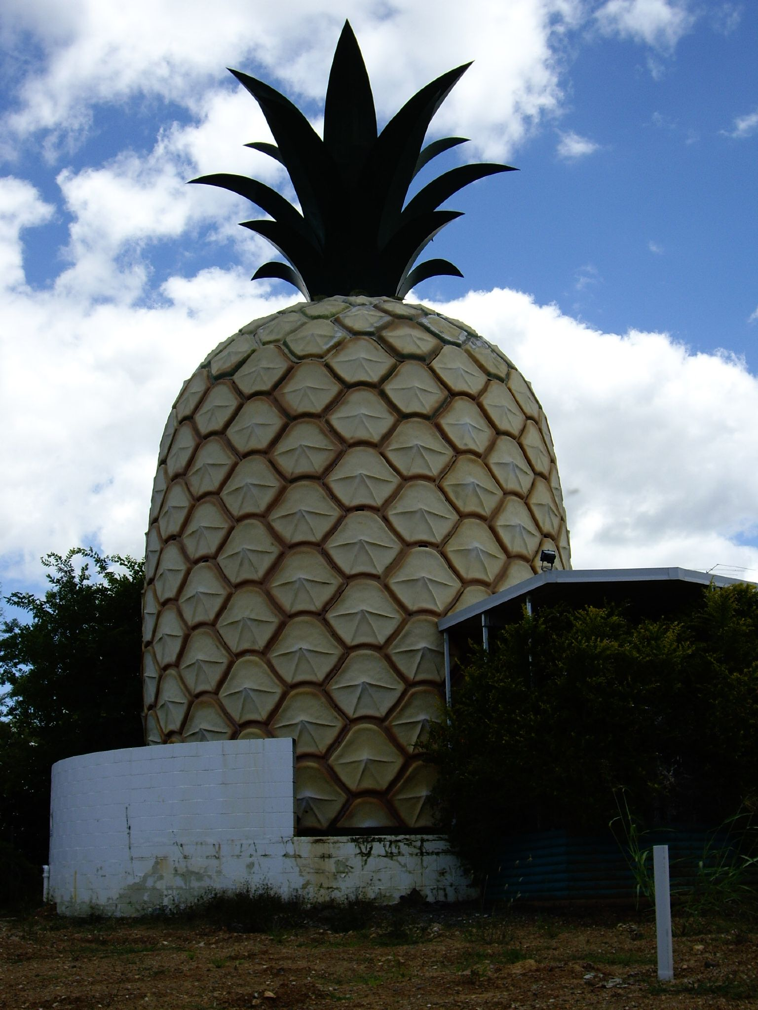 Big Pineapple, Gympie, Queensland